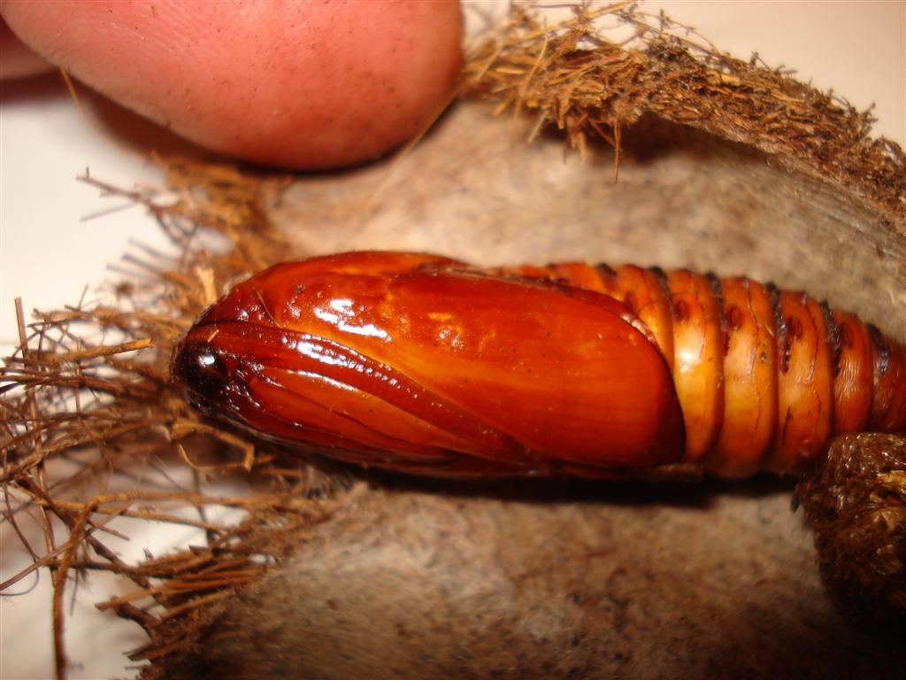 Nymphe du Paysandisia archon